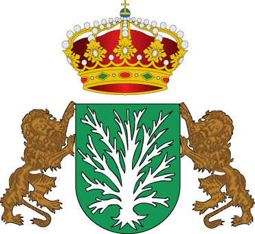 Escudo de Fresno de Cantespino, en Segovia (España)